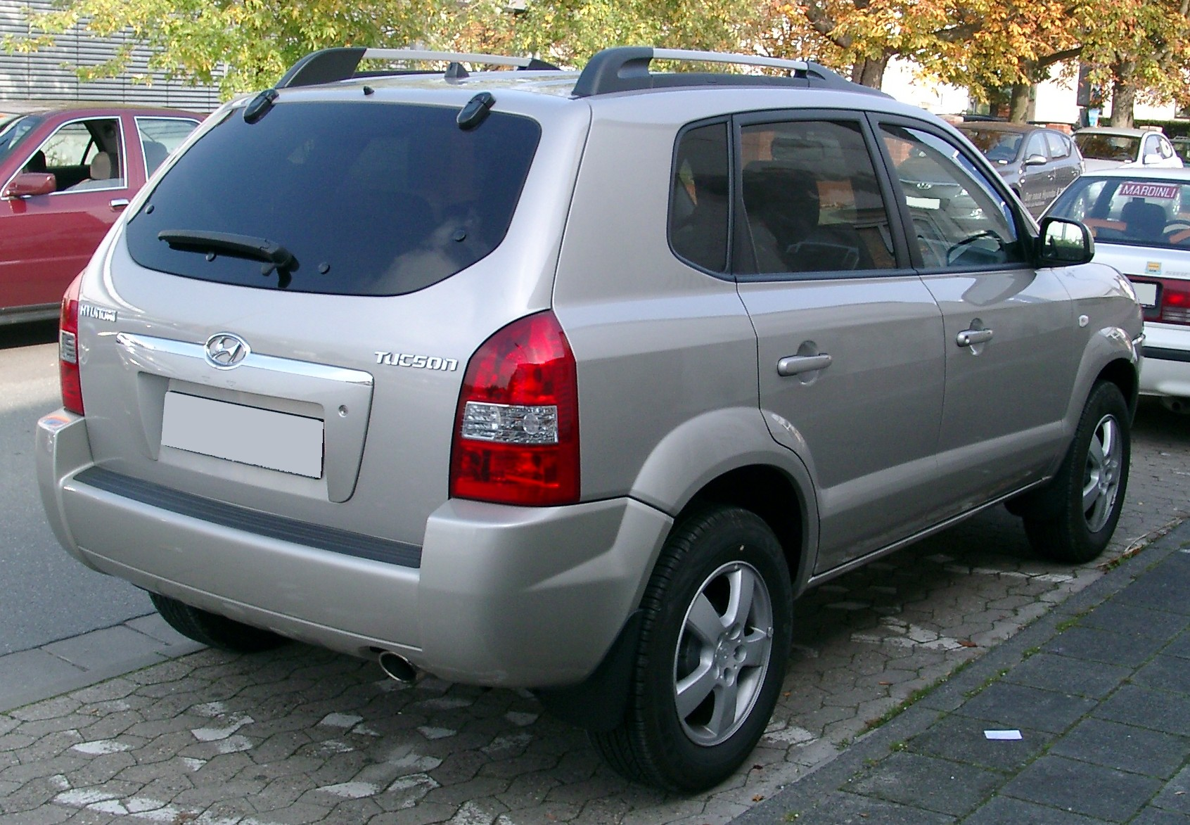 Hyundai Tucson